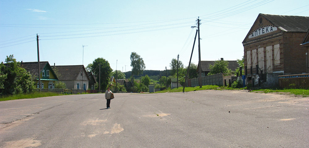 Беларуская (тарашкевіца): Моўчадзь